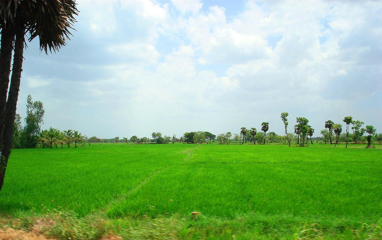 Thanjavur area rice paddy field